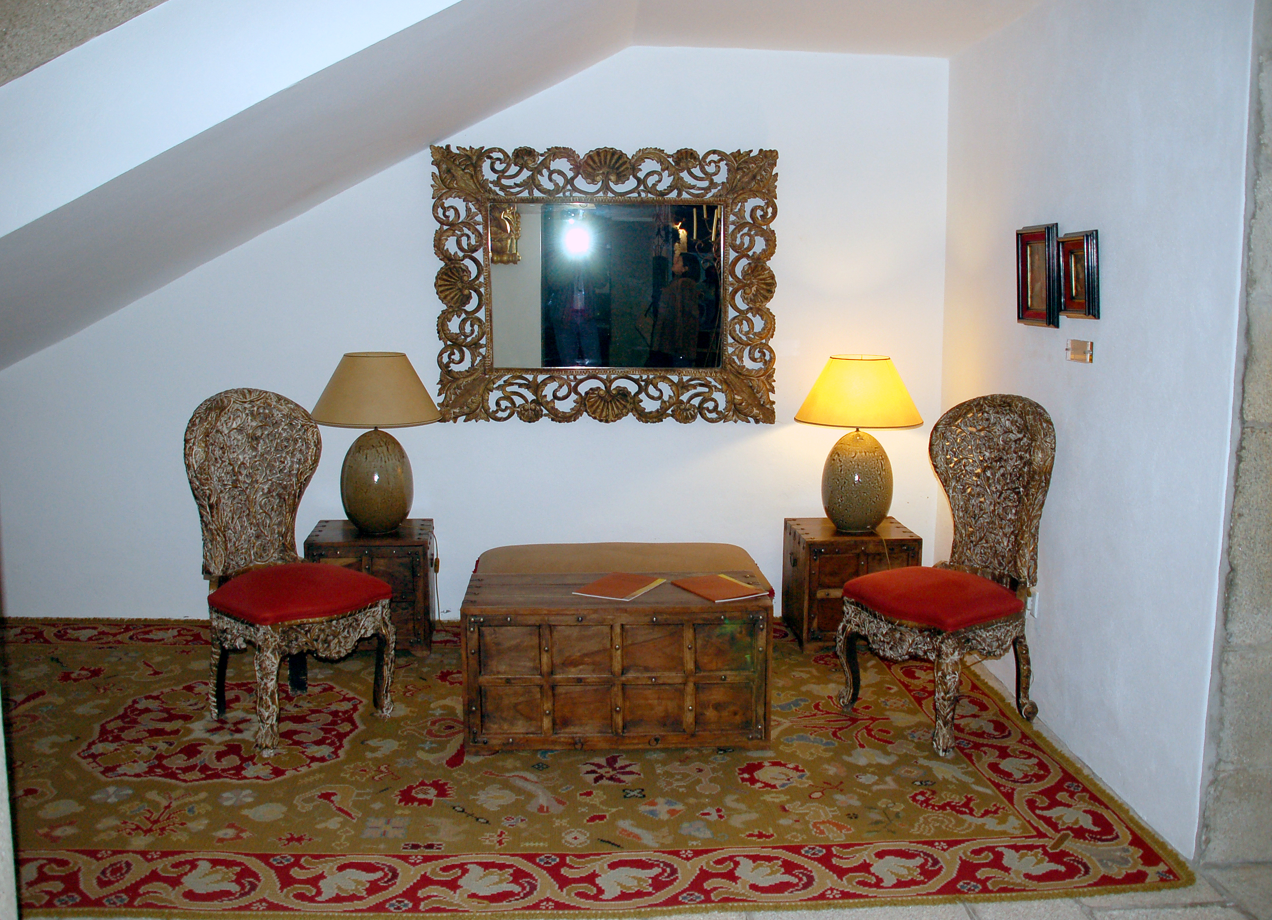 Convento do Desagravo do Séc. XVIII e está localizado perto da Serra da Estrela e Serra do açôr c/ambiente romântico e tranquilo .